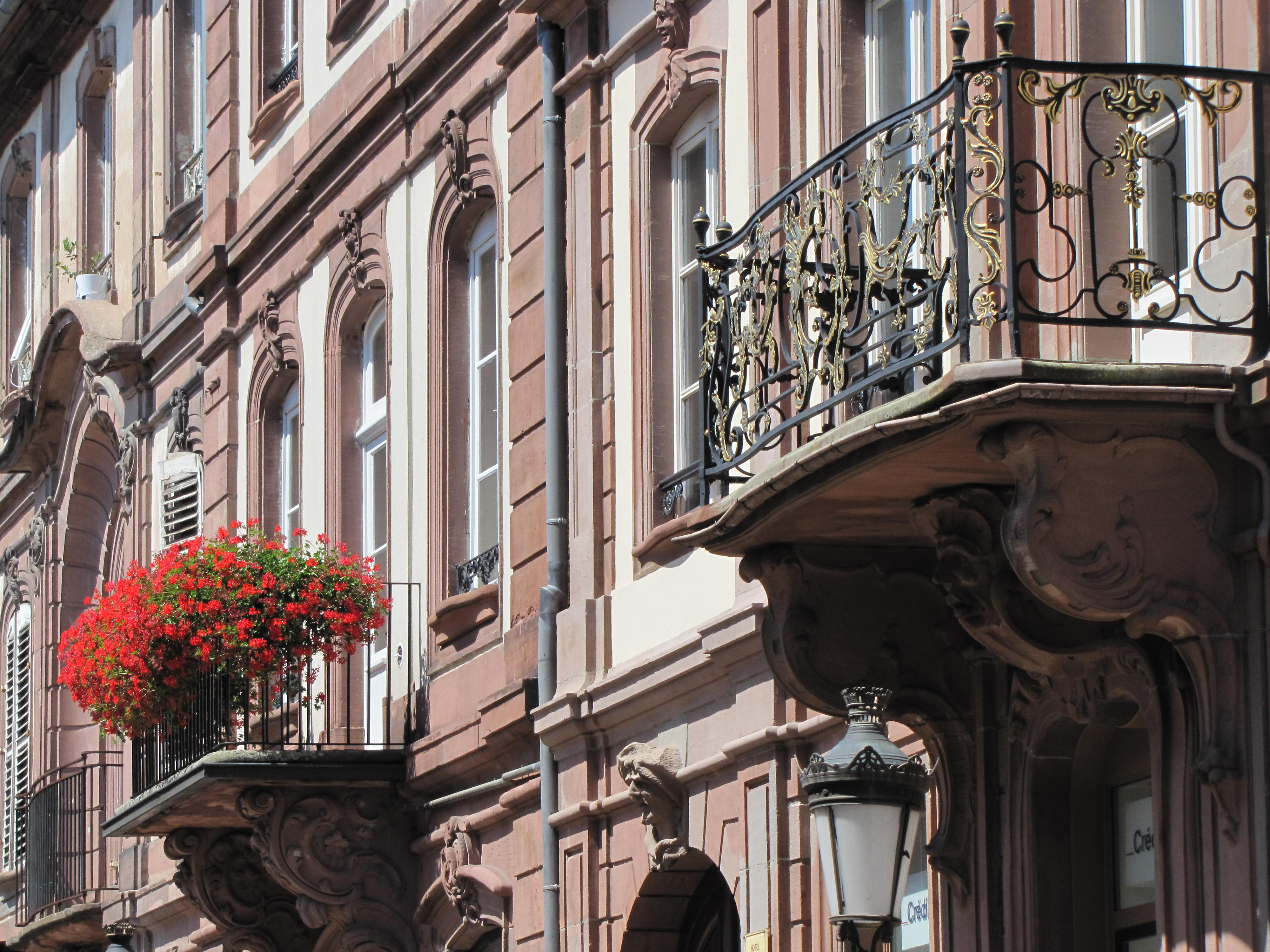 Alsace, Bas-Rhin, Haguenau, Ancien Hôtel du bailli Hoffmann (XVIIIe), 57 Grand’Rue (PA00084730, IA00061967).